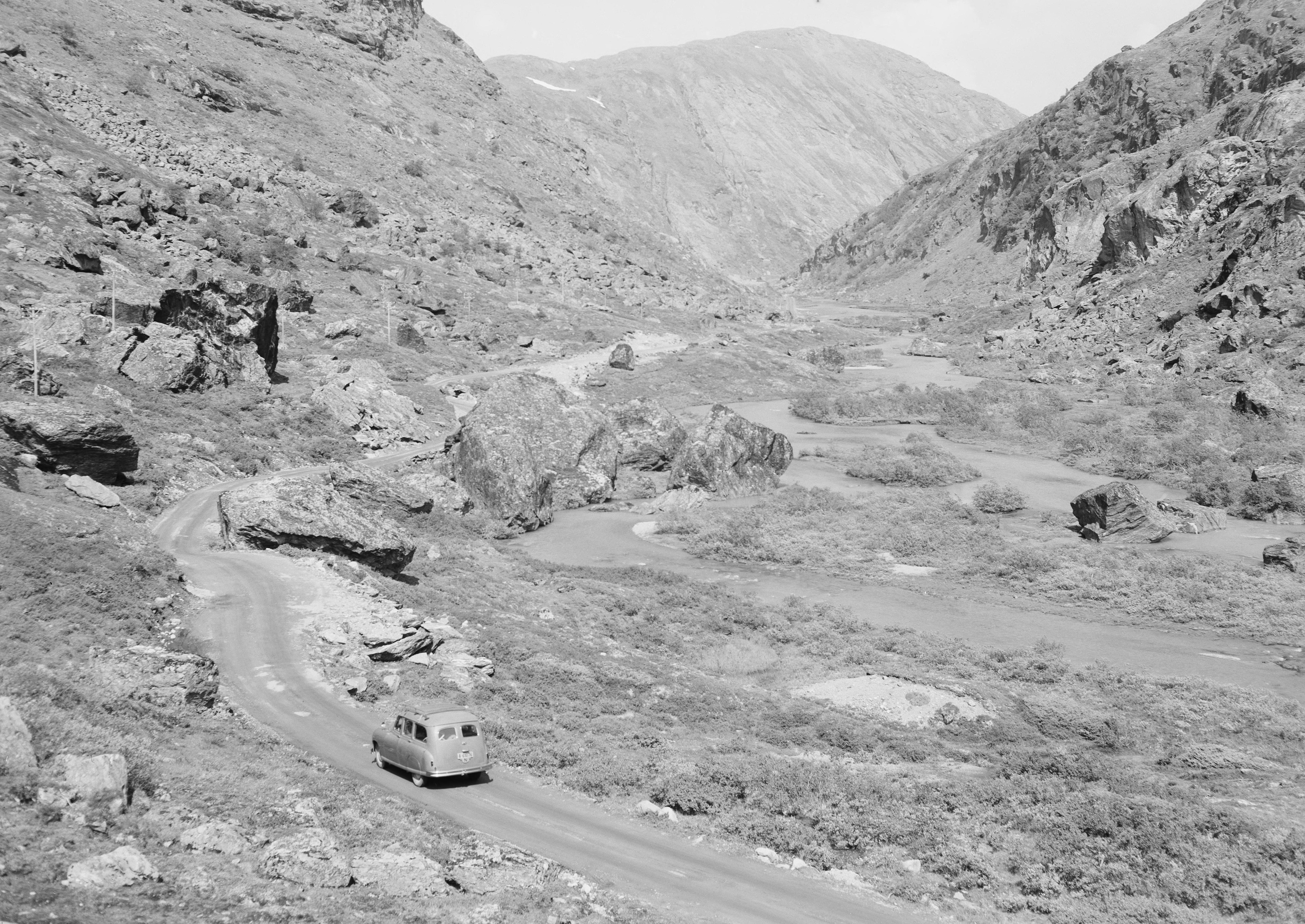 Bildet er hentet fra Nasjonalbibliotekets bildesamling Breidsæterdalen, Lom, Oppland